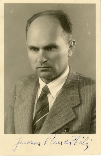 Juozas Paukštelis (tikoji pavardė Ptašinskas, 1899 m. kovo 2 d. Titoniuose, Linkuvos valsčius, Panevėžio apskritis – 1981 m. liepos 20 d. Kėdainiuose) – Lietuvos rašytojas, prozininkas, dramaturgas, vertėjas.